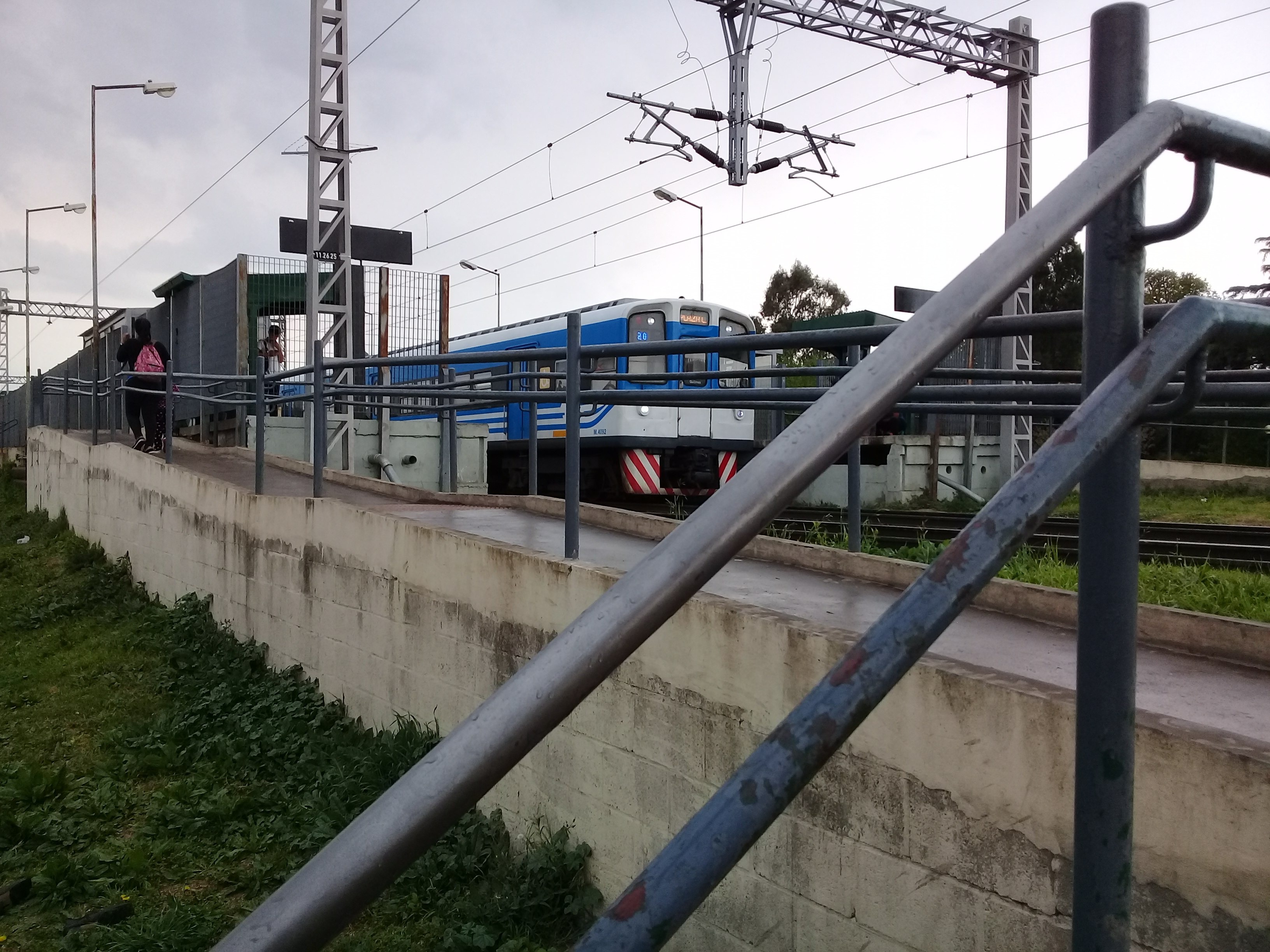 Imagen tomada desde el paso peatonal de Ardigó. en la imagen se aprecia una formacion electrica Toshiba.